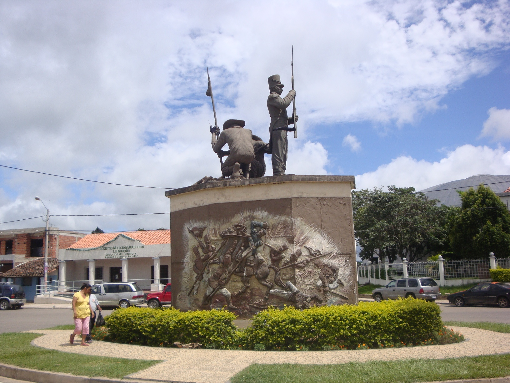 La Guardia, Bolivia